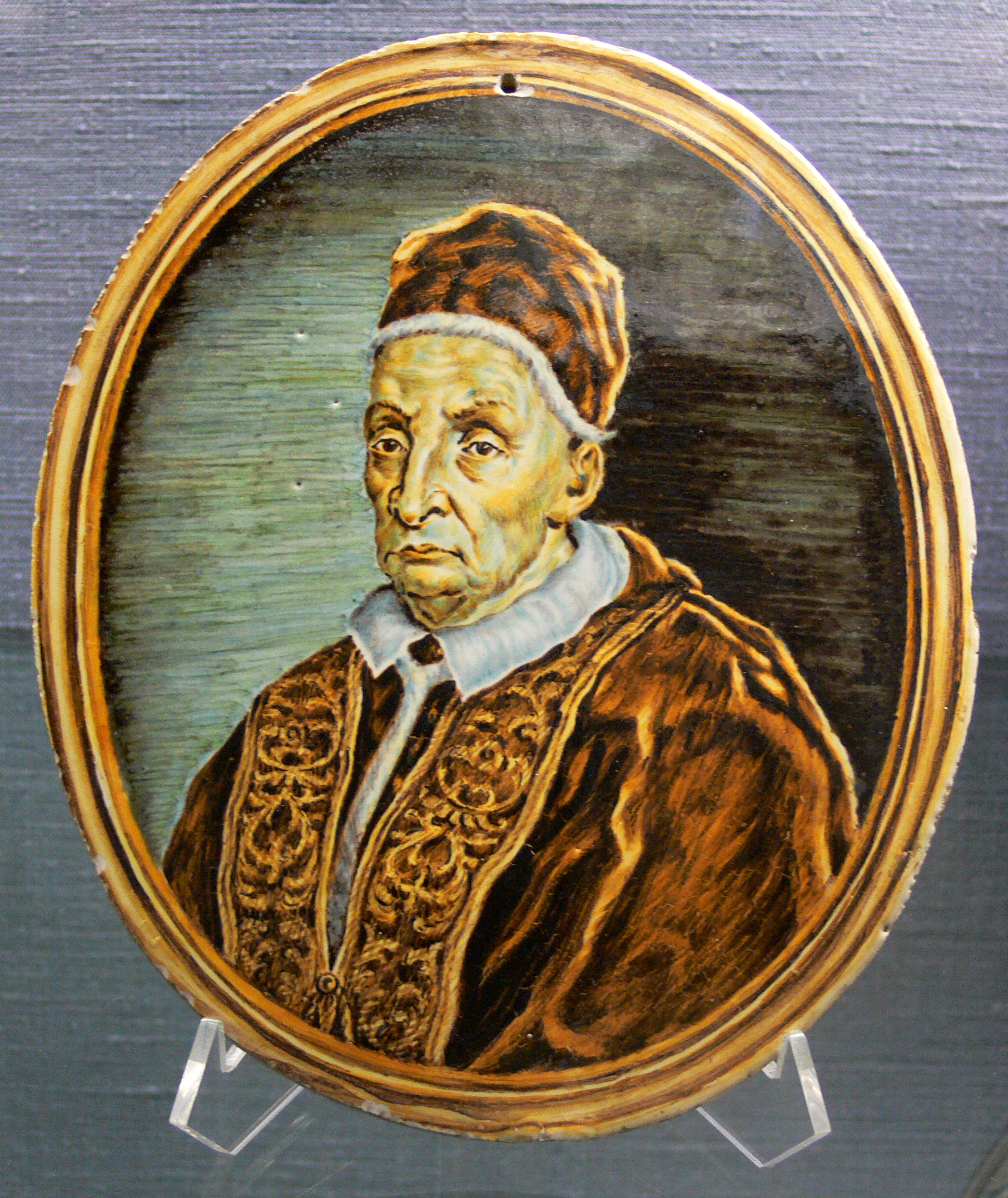 Brustbild eines Papstes (wohl Papst Benedikt XIII.), von Carmine Gentil (?), Castelli, ca. 1725–1730 Kunstgewerbemuseum Berlin, 1827 aus dem Nachlass Jacob Salomon Bartholdy, Inv. Nr. K 2210